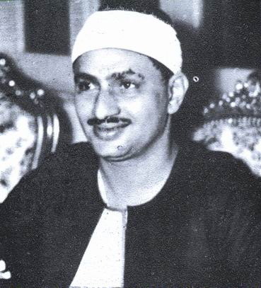 محمد صديق المنشاوي قارئ القرآن